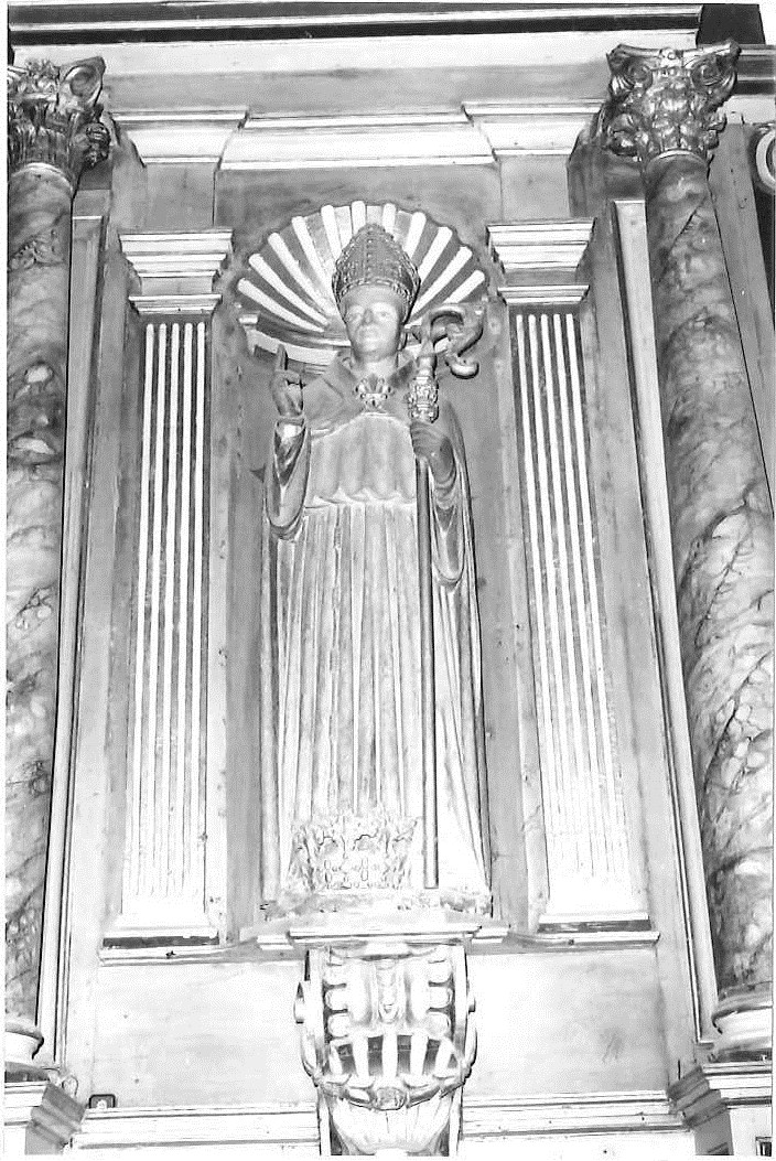 Statue du XVe siècle représentant saint Louis d'Anjou, église de Carcenac, Salmiech, Aveyron, France.